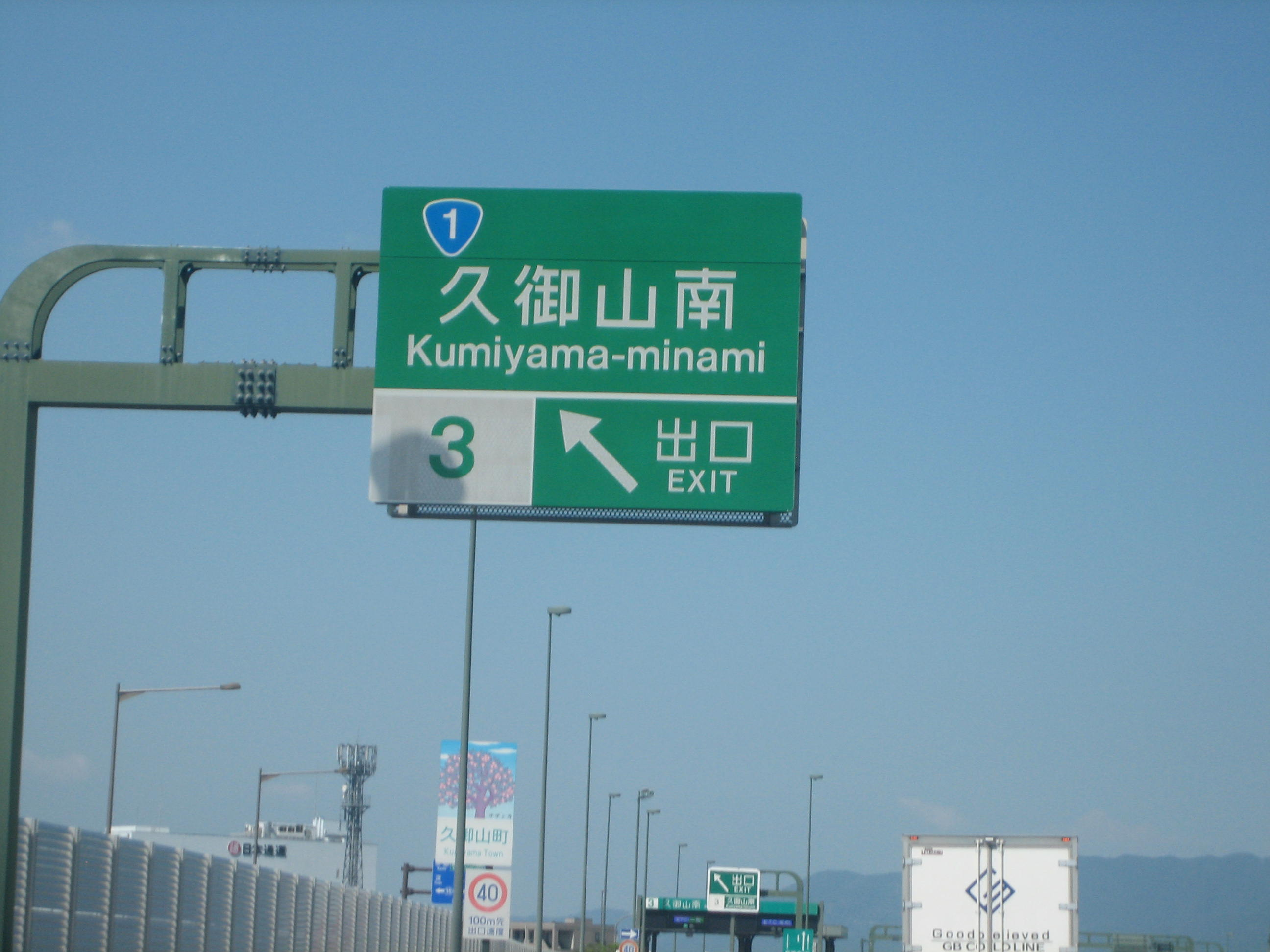 久御山南IC